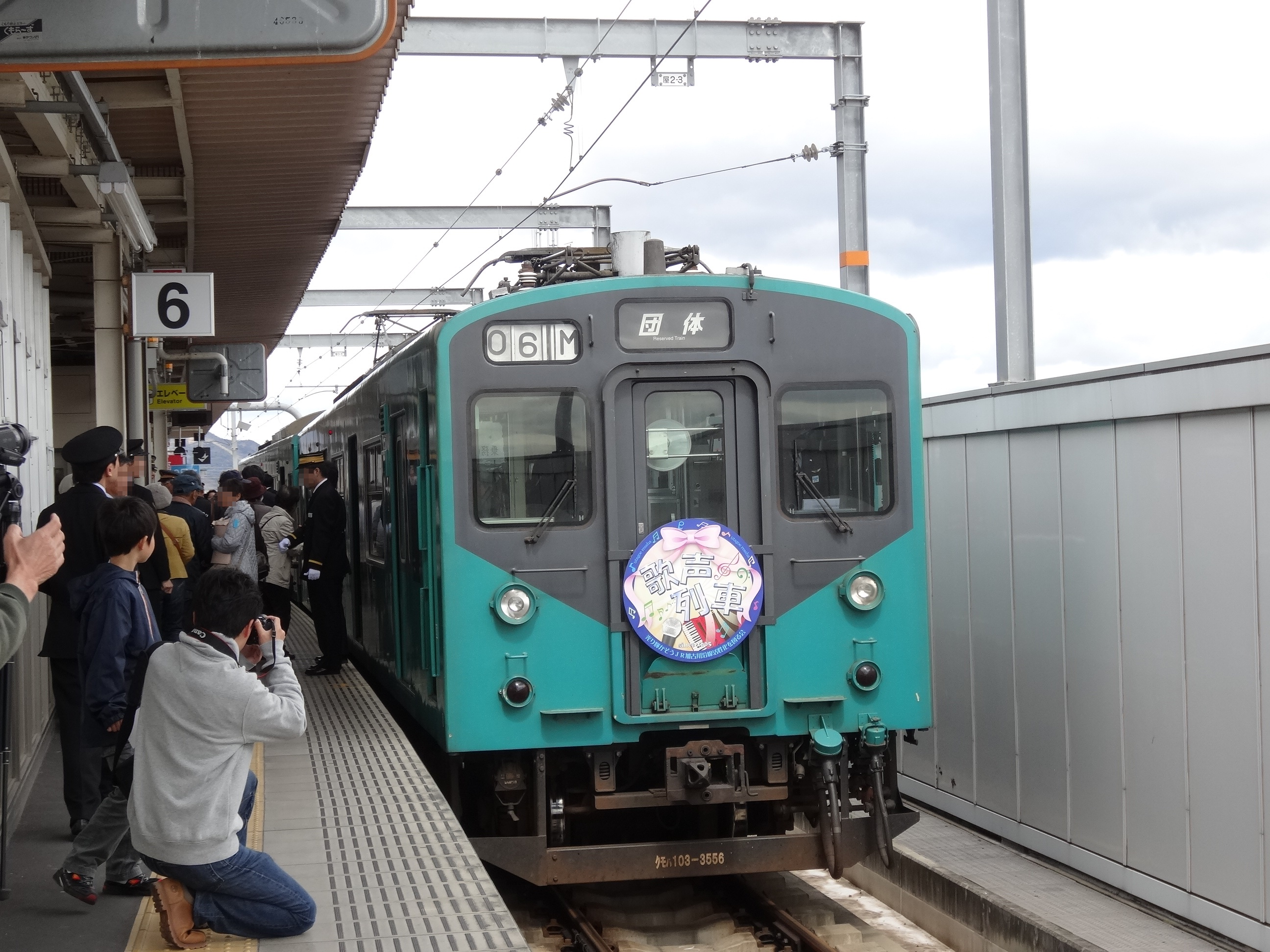 歌声列車 ※画像を一部加工しています。